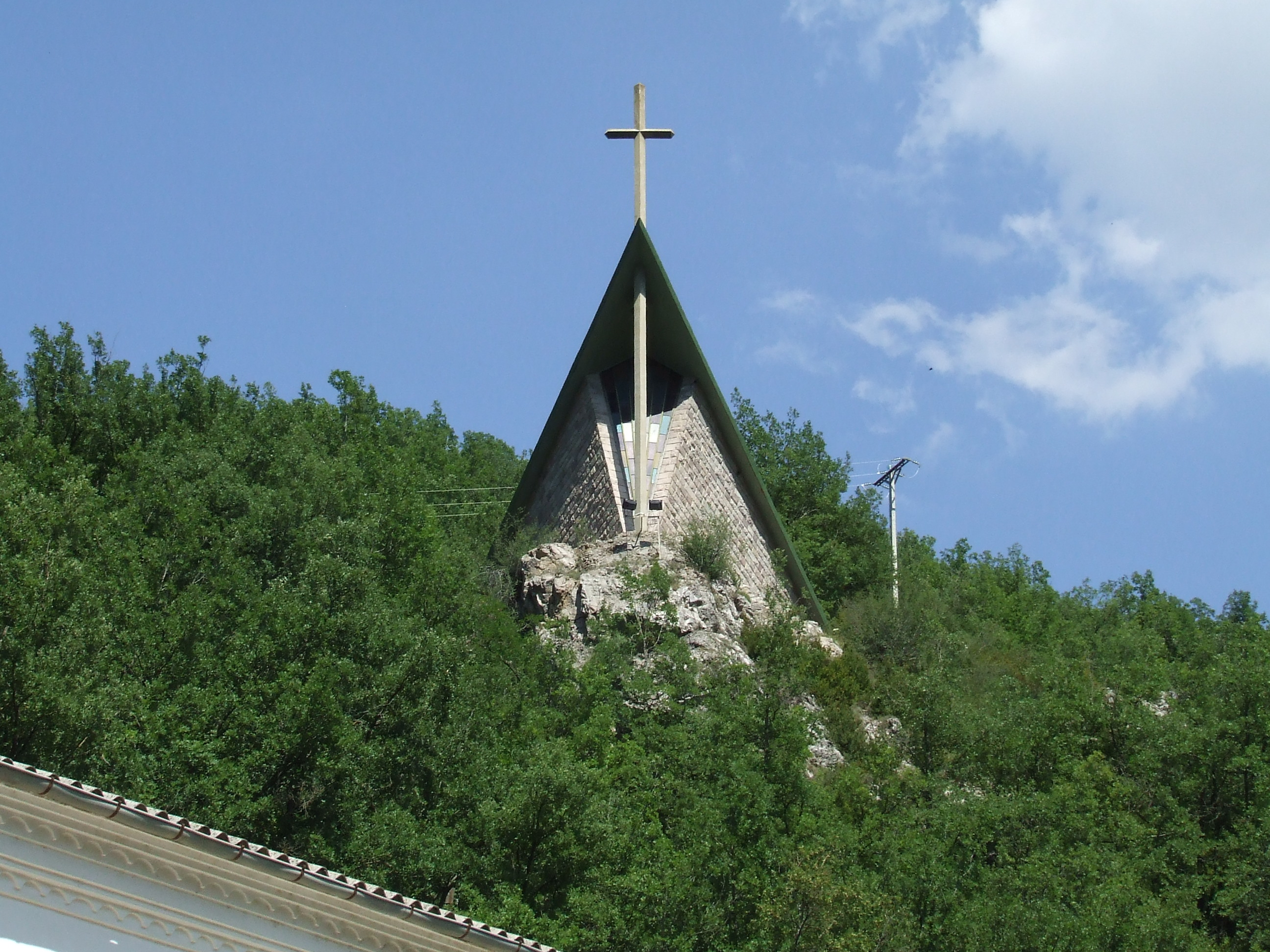 L'ermita de Xerallo, enlairada damunt del poble (Sarroca de Bellera, Pallars Jussà)